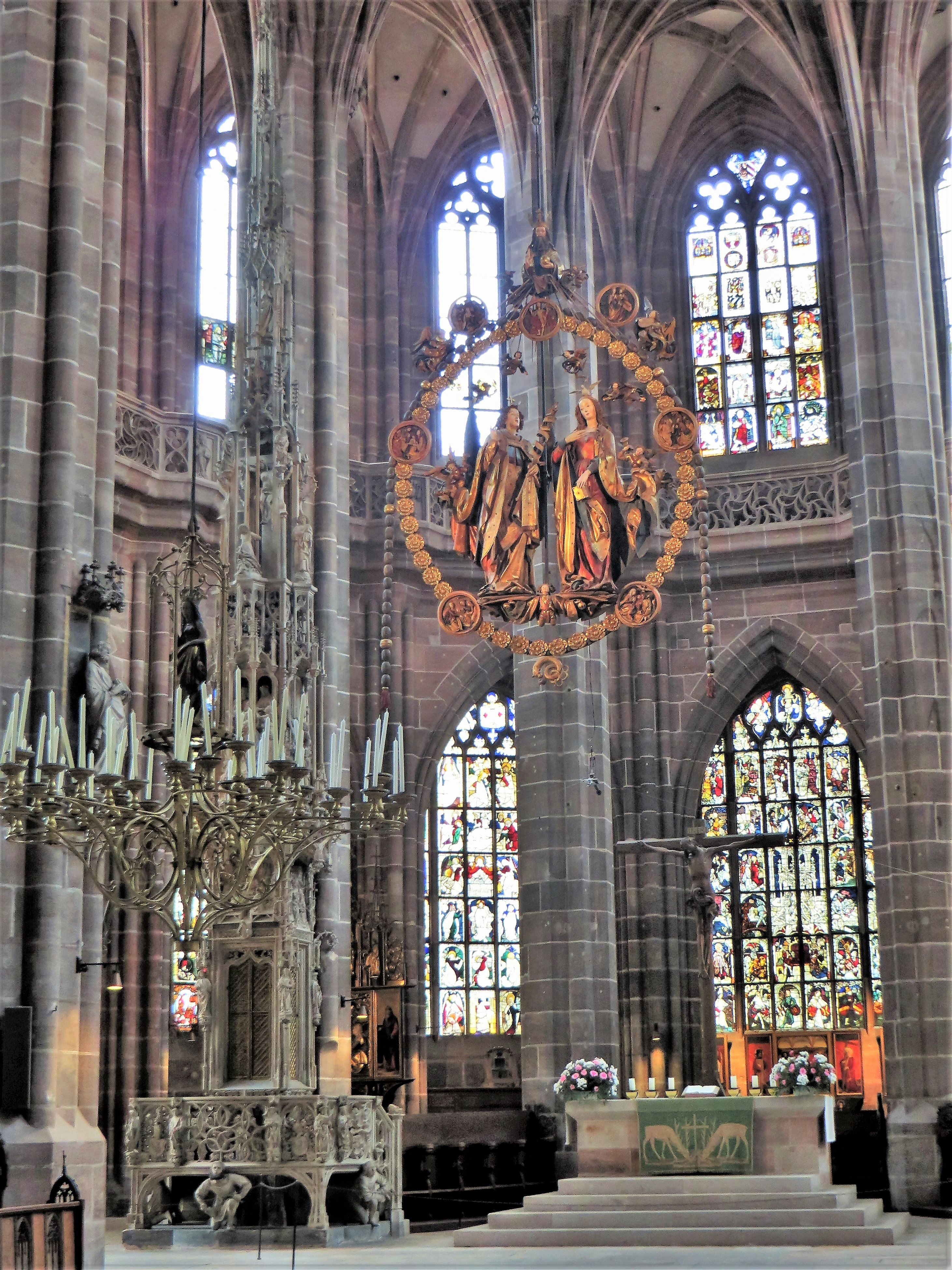 Ev.-luth. St. Lorenz Kirche in Nürnberg, Lorenzer Platz. Blick in den Hallenchor. Altar mit Kruzifix von Veit Stoß (um 1525). Links das Sakramentshaus (Adam Kraft, 1493-96). Darüber schwebt der Engelsgruß von Veit Stoß (1517/18). Hinter dem Altar über dem Krellaltar das Kaiserfenster, eine Stiftung von Kaiser Friedrich III. von 1476/77. Höhe des Hallenchors 24,2 m und Breite 28,6 m.